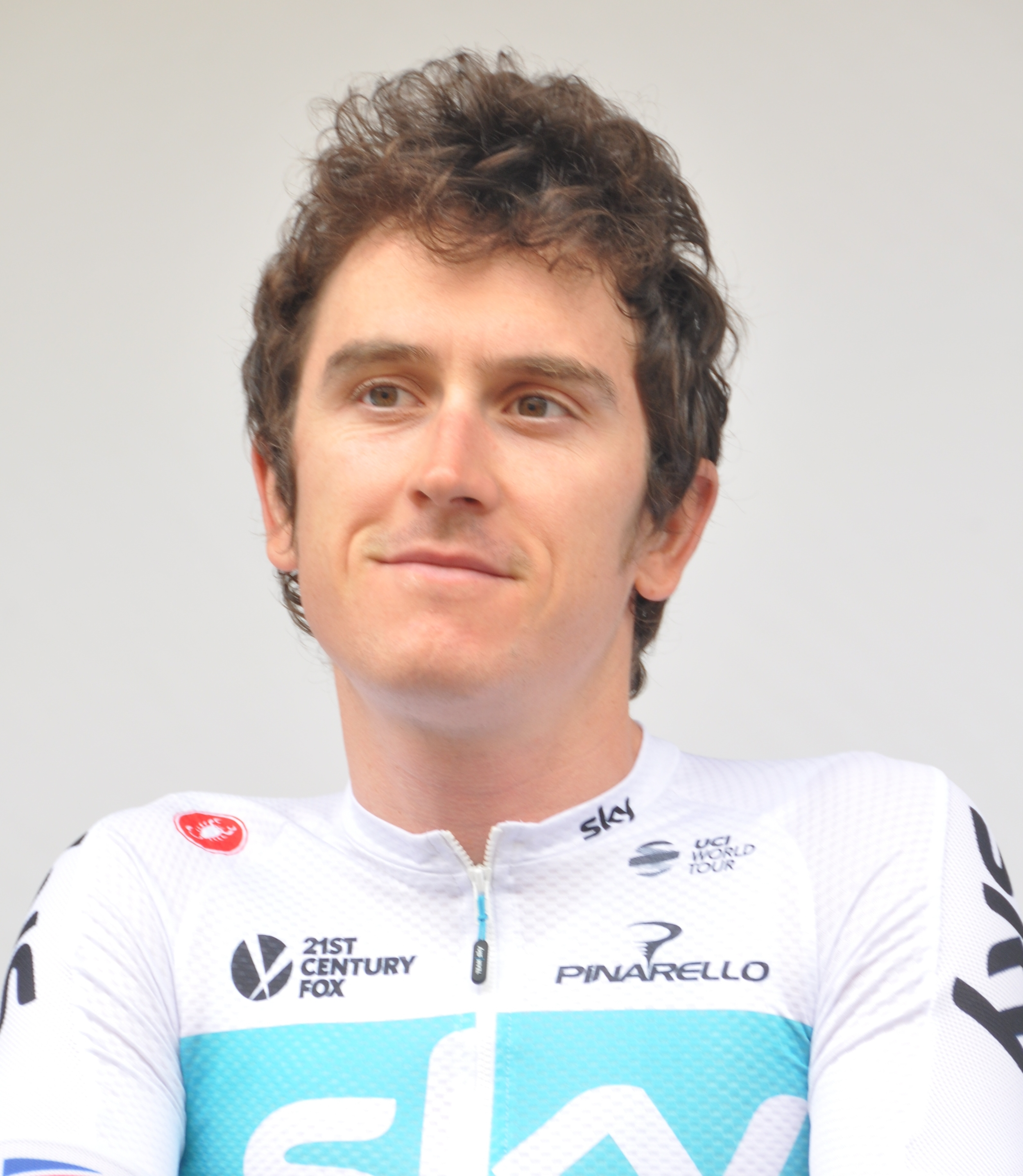 Geraint Thomas, britischer Radrennfahrer